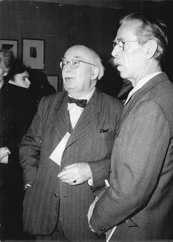 Berlin, Ausstellung sowjetischer Grafik Zentralbild Funck 5.1.1955 Ausstellung Sowjetischer Graphik Im Zentralen Haus der Deutsch-Sowjetischen Freundschaft in Berlin wurde am 5.1.1955 eine Ausstellung hervorragender sowjetischer Graphik aus der künstlerischen Schaffensperiode 1917-1954 eröffnet. Die Ausstellung findet auf Initiative der Deutschen Akademie der Künste im Rahmen des Sowjetisch-Deutschen Kulturabkommens statt. Der Eröffnung wohnten der Vorsitzende des Ministerrates der Deutschen Demokratischen Repubkik Otto Grotewohl, Volkskammerpräsident Dr. Dieckmann, das Diplomatische Korps, sowie Mitglieder der Akademie und Nationalpreisträger bei. UBz: Der Vizepräsident der Deutschen Akademie der Künste in Berlin, Nationalpreisträger Otto Nagel und Nationalpreisträger Arnold Zweig, in den Ausstellungsräumen. Abgebildete Personen: Nagel, Otto Prof.: Maler, Präsident der Akademie der Künste (AdK), Nationalpreisträger, Vaterländischer Verdienstorden (VVO) in Gold, DDR (GND 118586300) Zweig, Arnold Prof. Dr.: Schriftsteller, Ehrenpräsident der Akademie der Künste (AdK), Volkskammerabgeordneter, Präsident des Deutschen PEN-Zentrums Ost und West, DDR